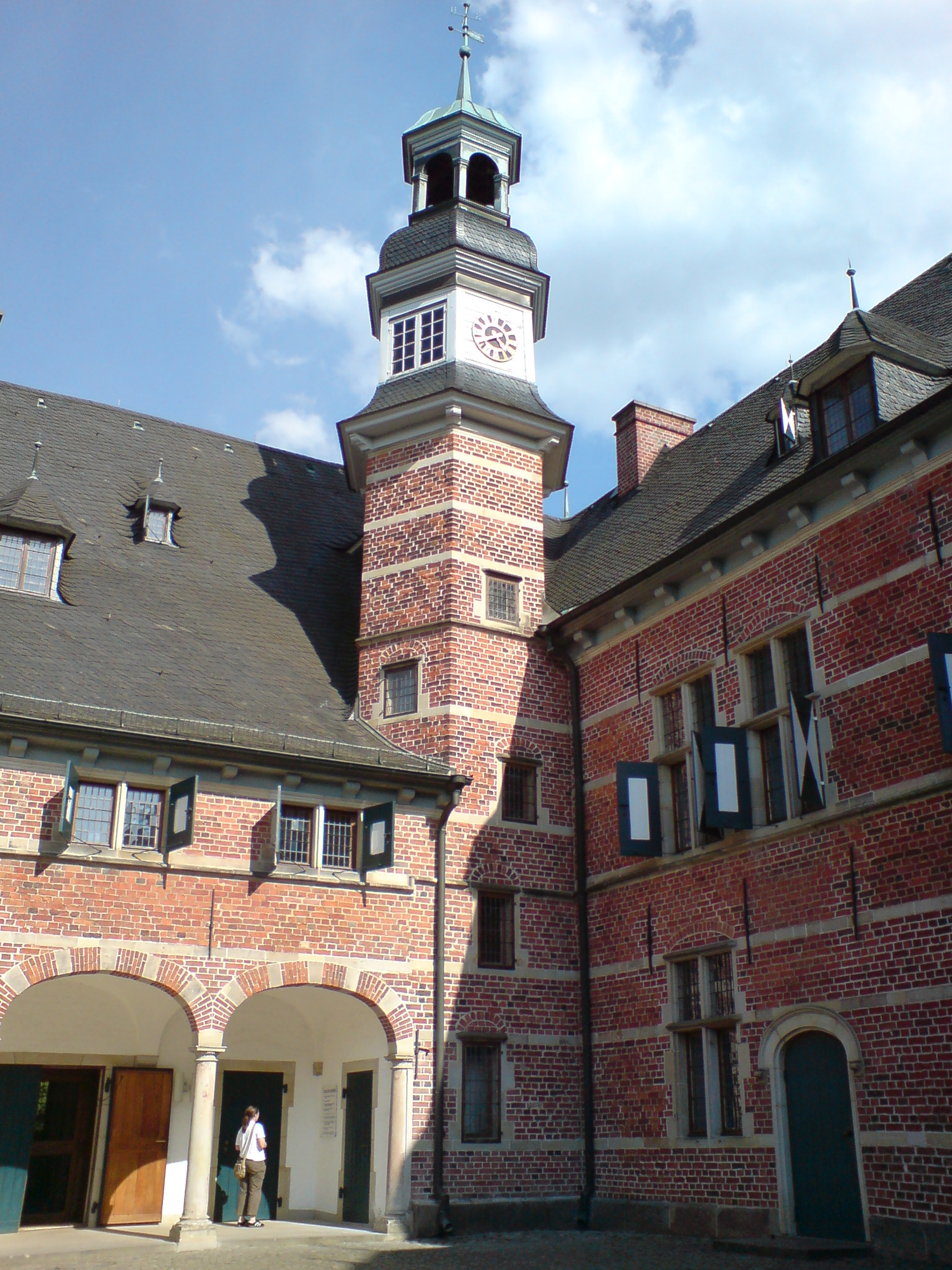 Schloss Reinbek, Treppenturm